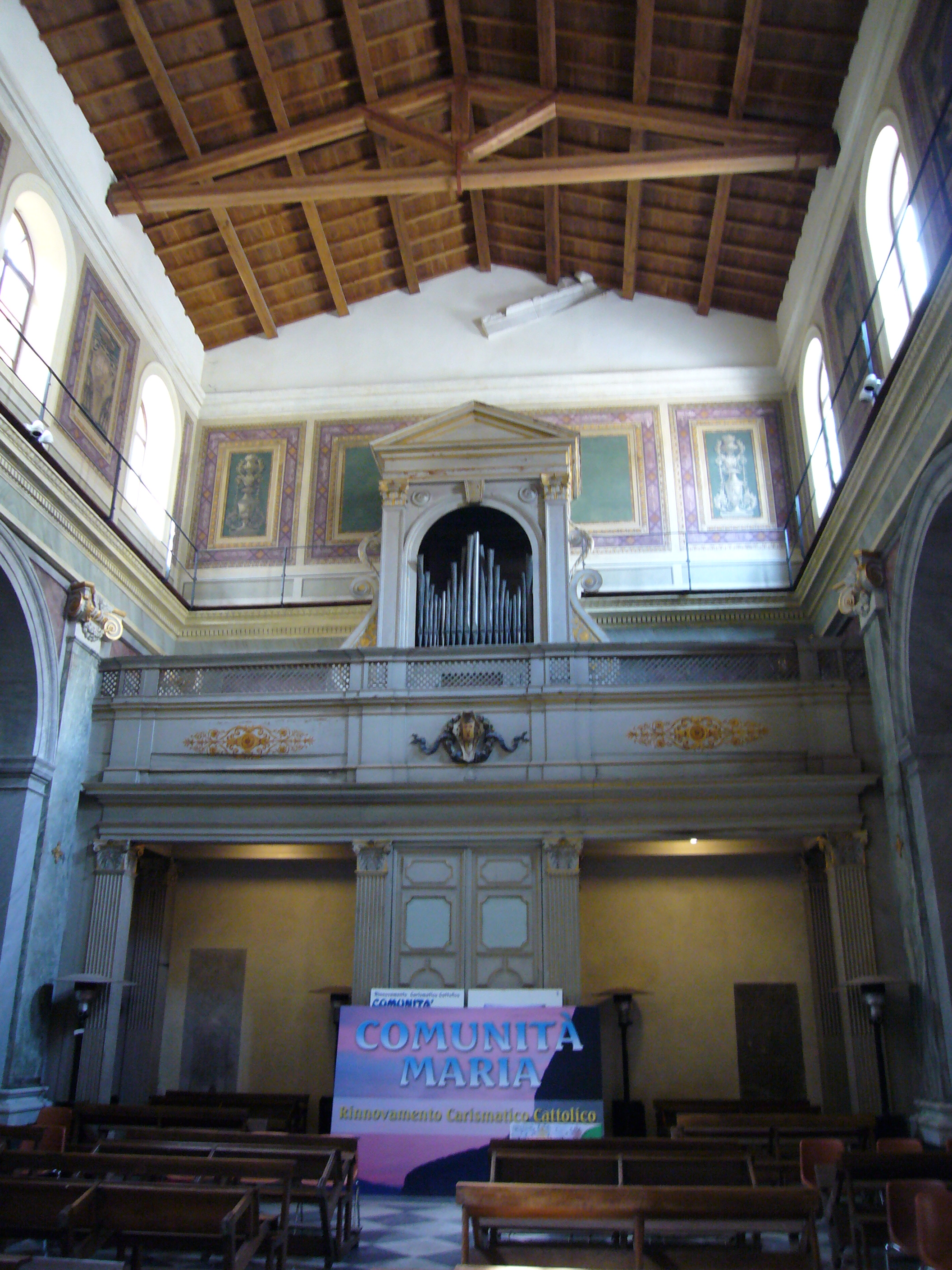 Roma, sant'Angelo in Pescheria. Organo.